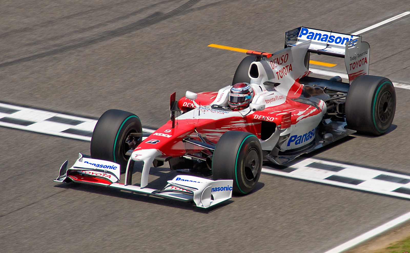 Trulli Spain 2009 Nikon D90 + Sigma 18-200 DC OS HSM 1/1250s - F/10 - 200mm - ISO400